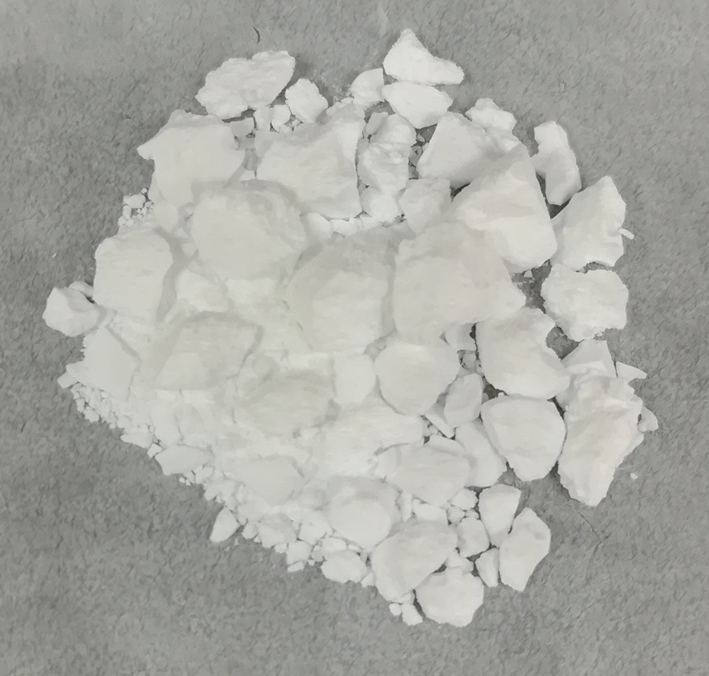 氢氧化镱[Yb(OH)3]，由硝酸镱和氢氧化钠反应得到，沉淀经过洗涤、干燥处理。